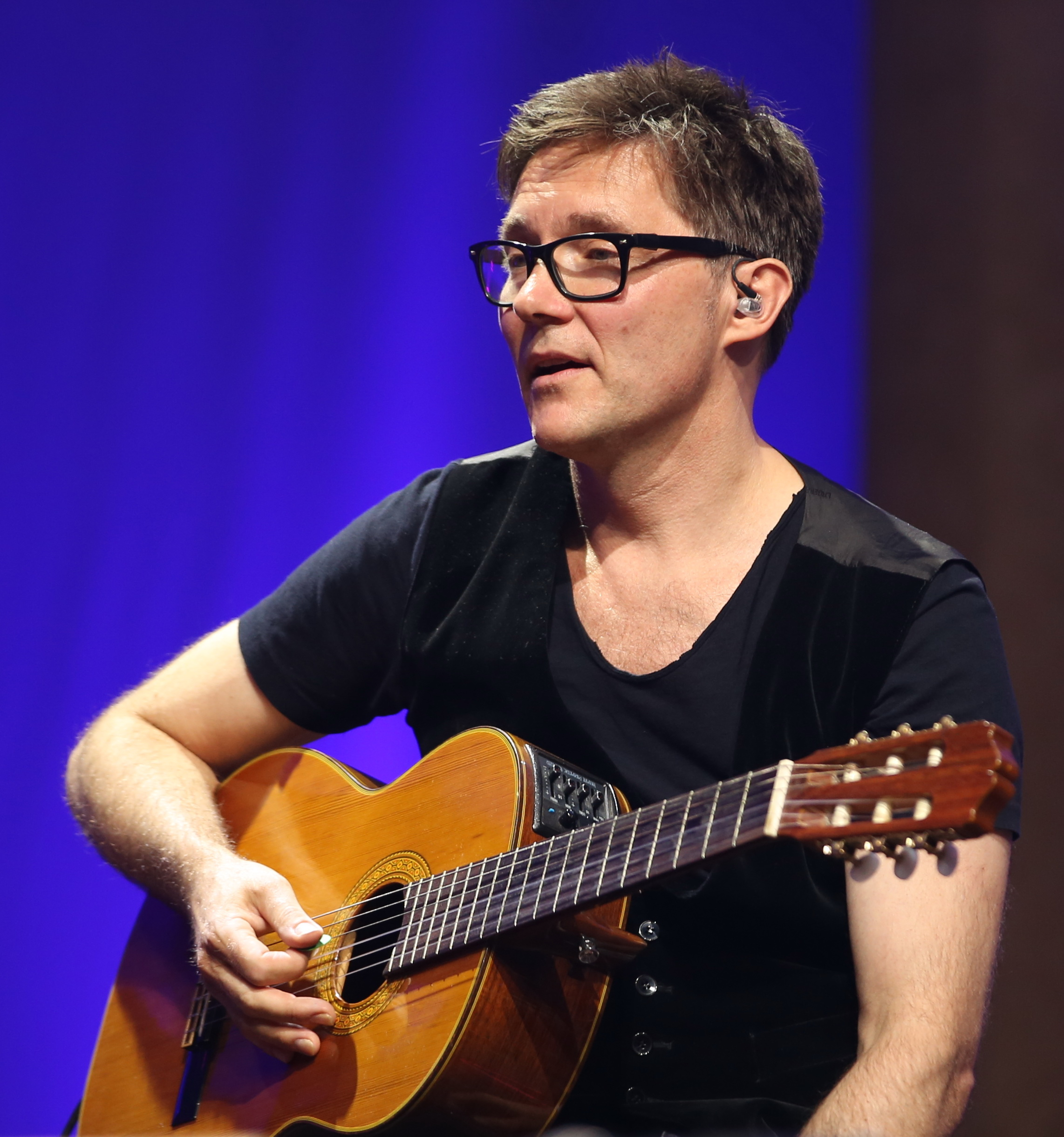 Konstantin Wecker mit Band auf dem Heimatsound Festival 2016 Jo Barnikel (Keyboards, Percussion, Gesang) Severin Trogbacher (Gitarre, Gesang) Jens Fischer Rodrian aka "f i s h e r" (Percussion, Gitarre, Gesang) Fany Kammerlander (Bassgitarre, Cello) Im Bild: Jens Fischer Rodrian